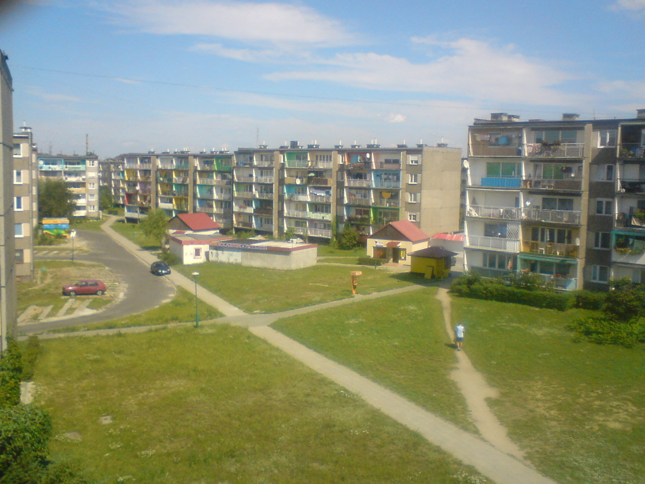 Osiedle Na Zatorzu, Zatorze, Żary